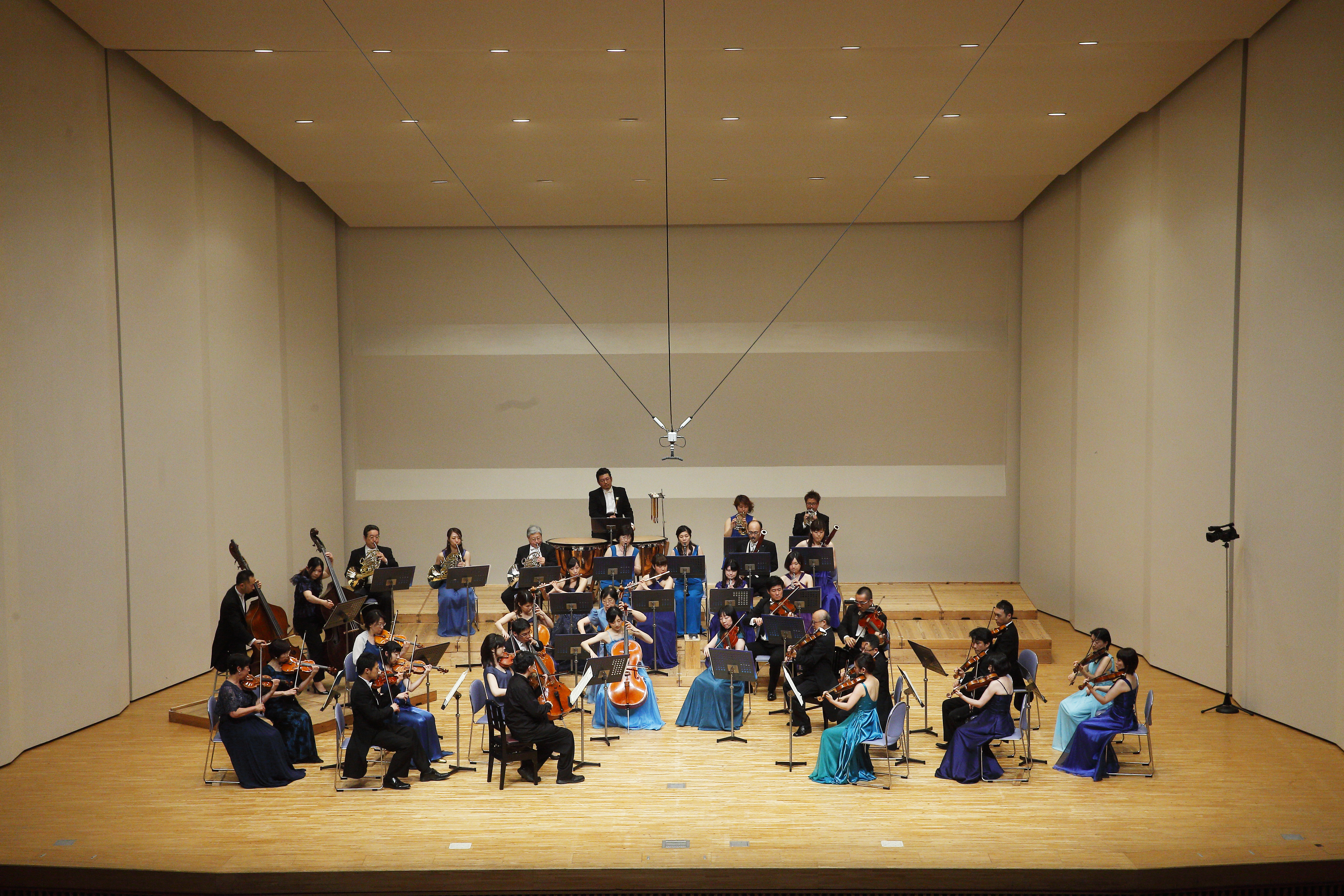 さくらホールでの定演総会の模様